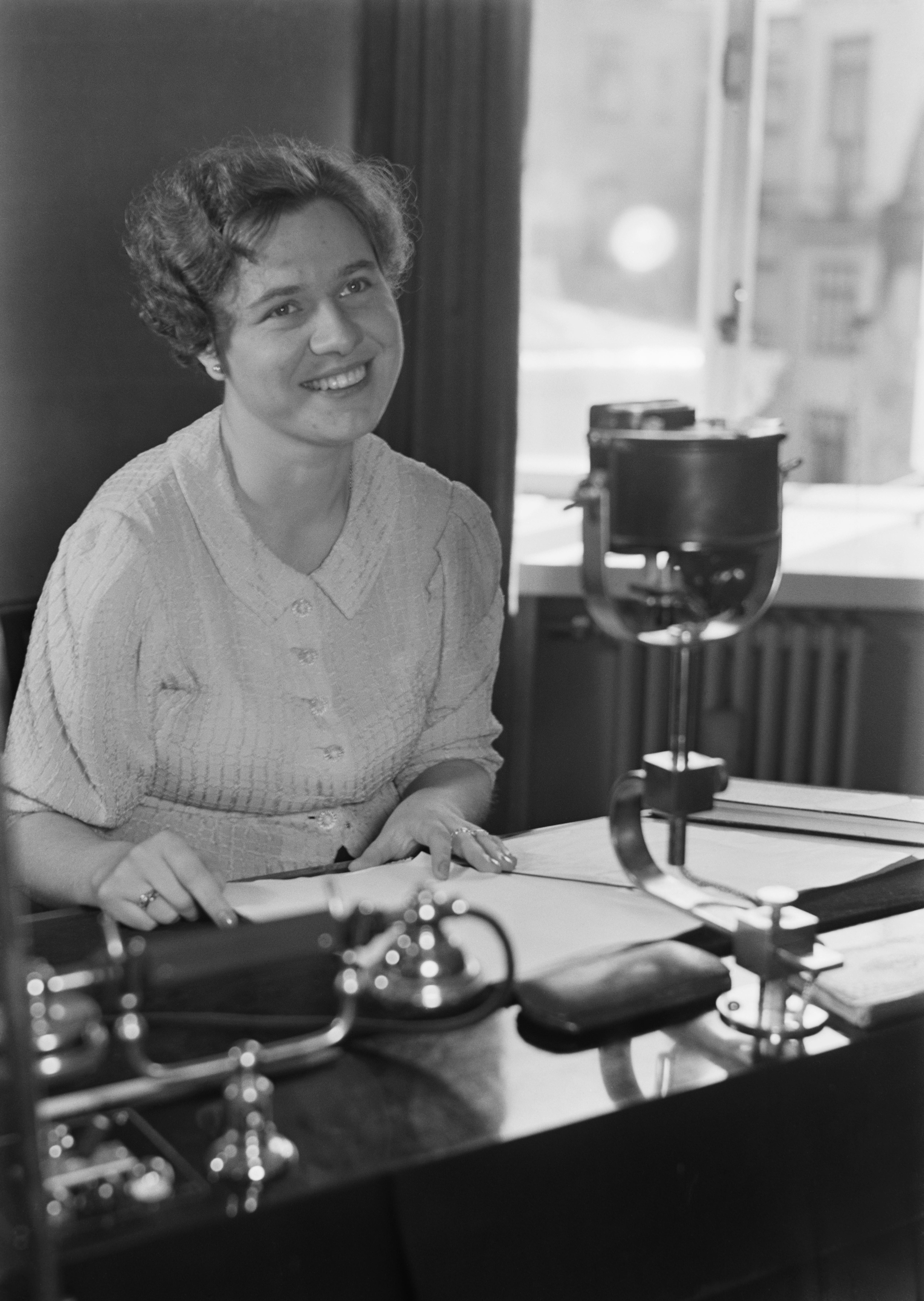 Radiokuuluttaja Kaisu Puuska (myöh. Kaisu Puuska-Joki) toimi kuuluttajana Yleisradiossa 1.1.1936 - 1.12.1972. Kuvausaika arvioitu vuosikymmenen tarkkuudella. Tiedätkö jotain tästä kuvasta? Jätä kommentti tai ota yhteyttä sähköpostitse: Tutustu Ylen arkistosisältöihin: Fler skatter från Yles arkiv: More about Yle, the Finnish Broadcasting Company